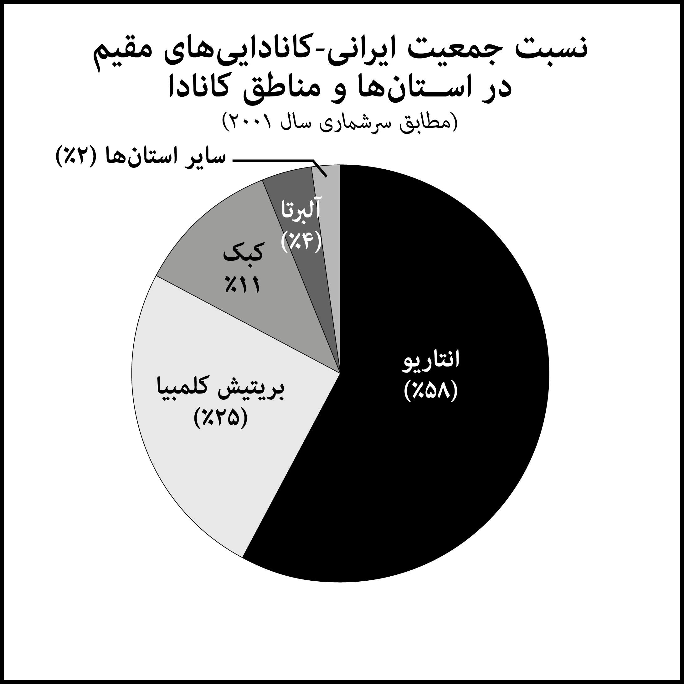 ۲۰۱۱جمعیت ایرانی-کانادایی‌ها در استانهای کانادا